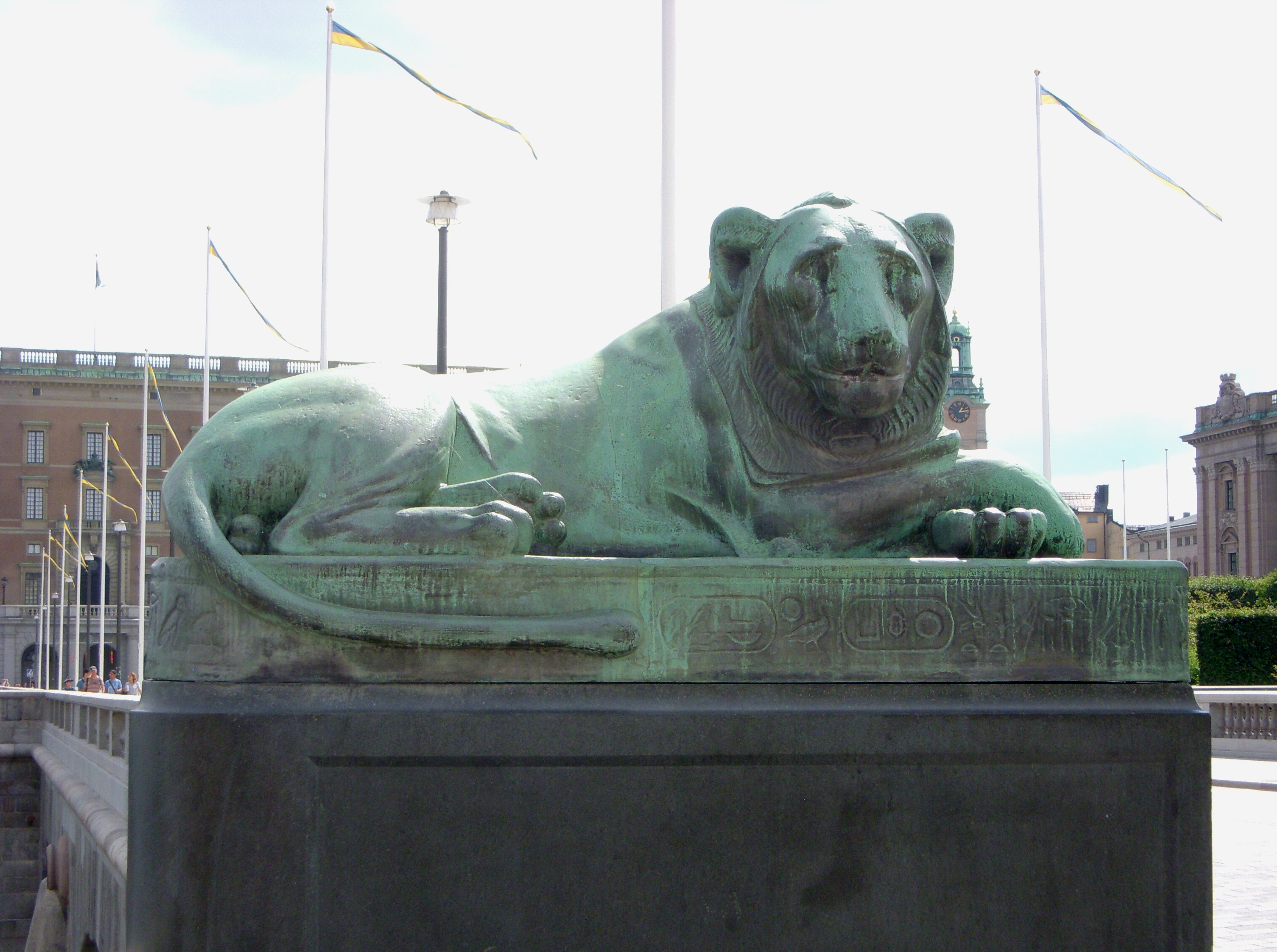 Norrbo, Stockholm, lejonskulptur, östra lejonet